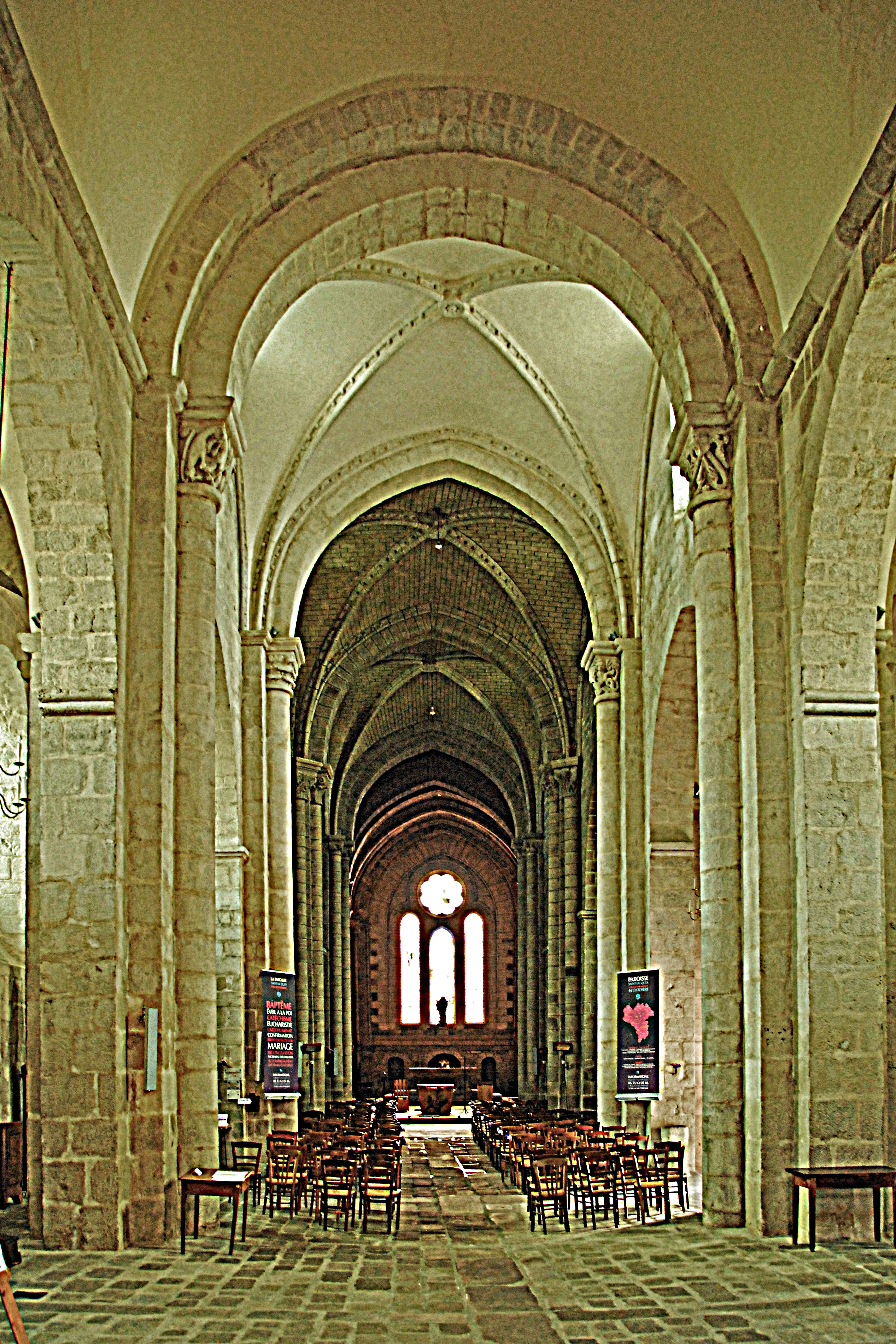 N.-D. de La Souterrain, Mittelschiff zum Chor